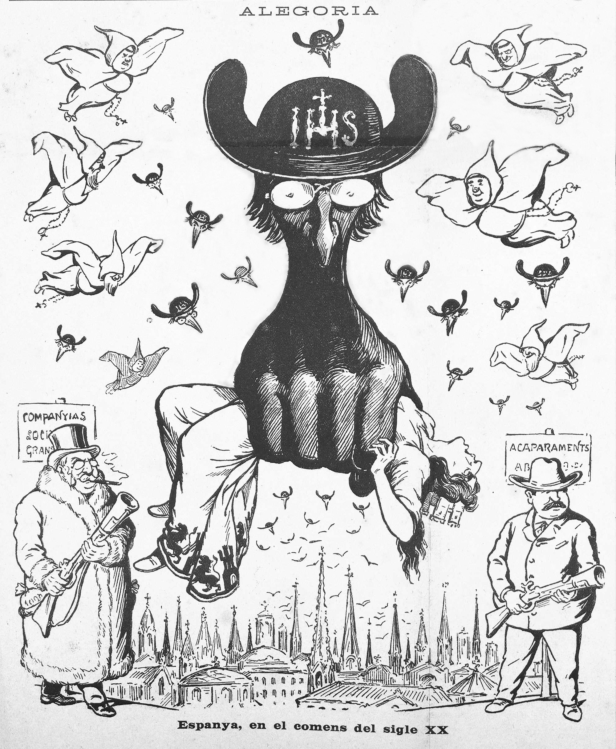 Alegoria.